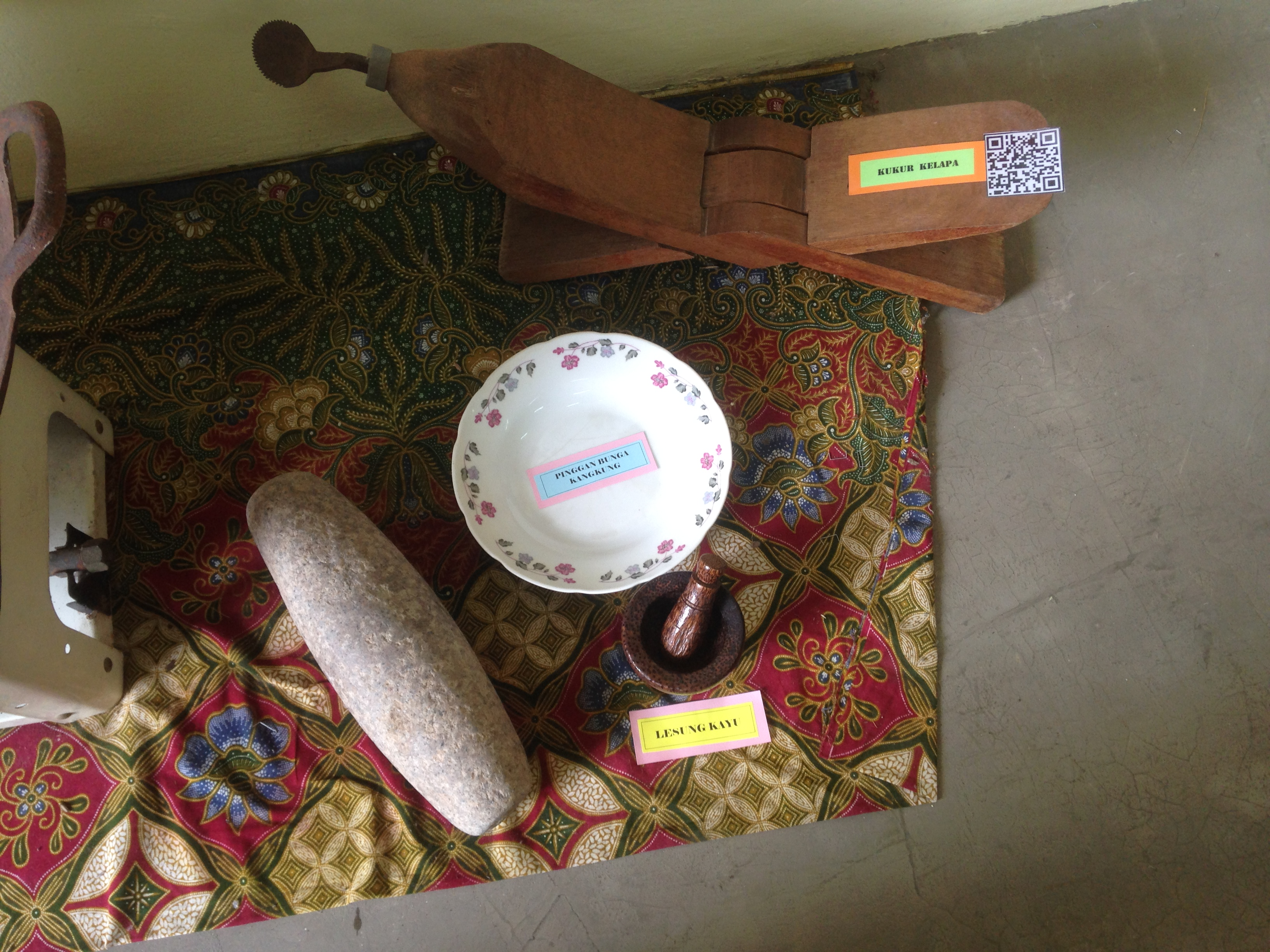 PERALATAN DAPUR